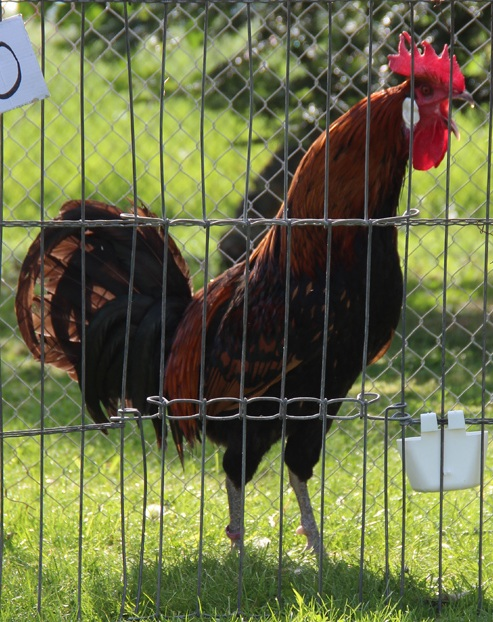 Vorm Langkraaier